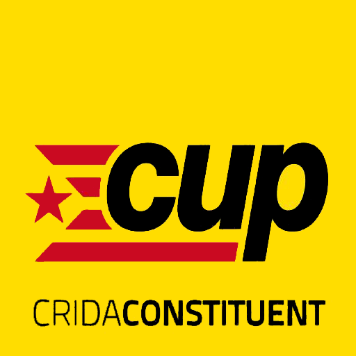 Emblema de CUP Crida Constituent